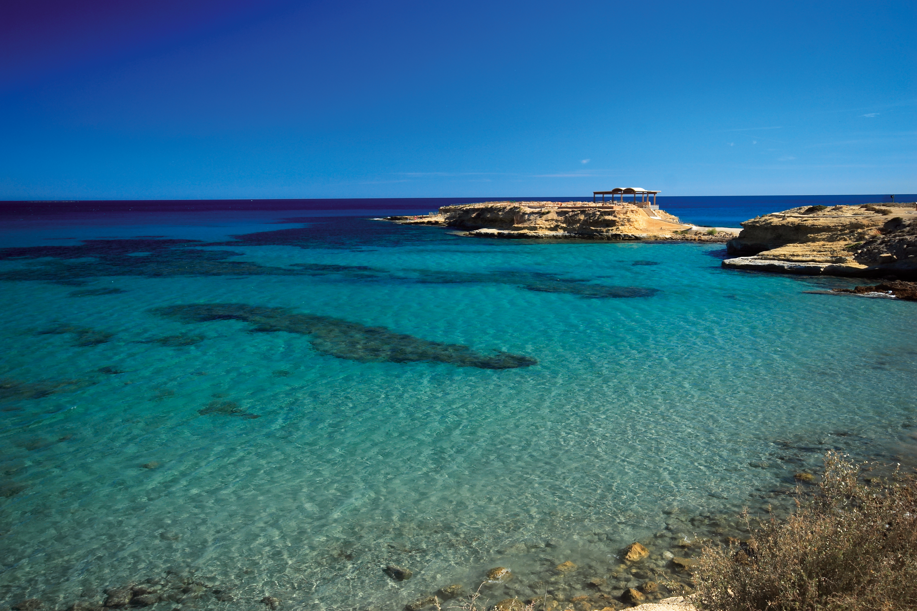 Foto de la playa de El Campello